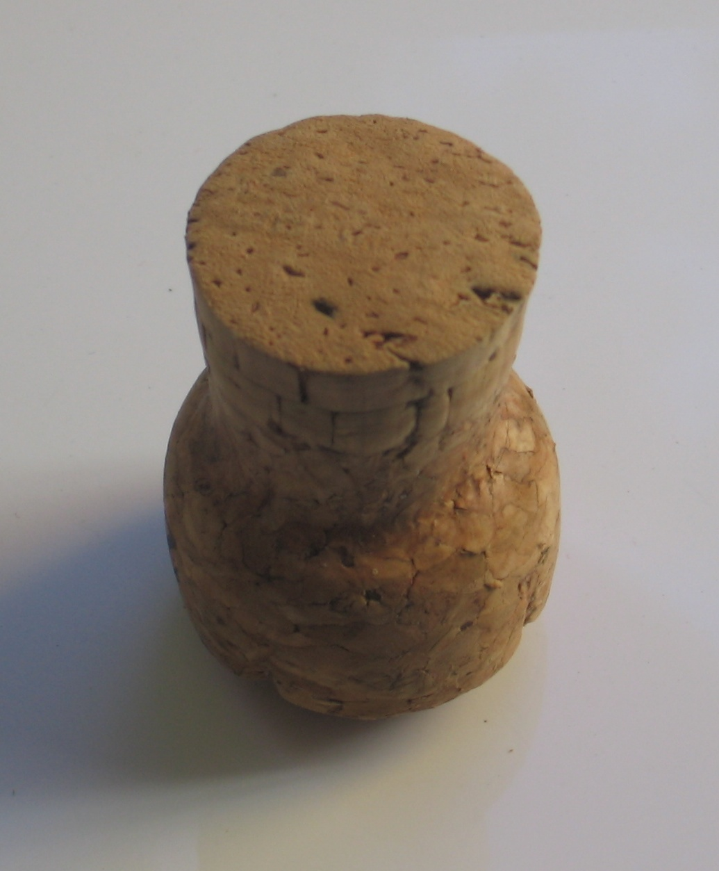 champagne cork